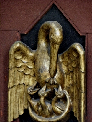 dreieinigkeit, erbarmen, pelikan, unikirche - marburg